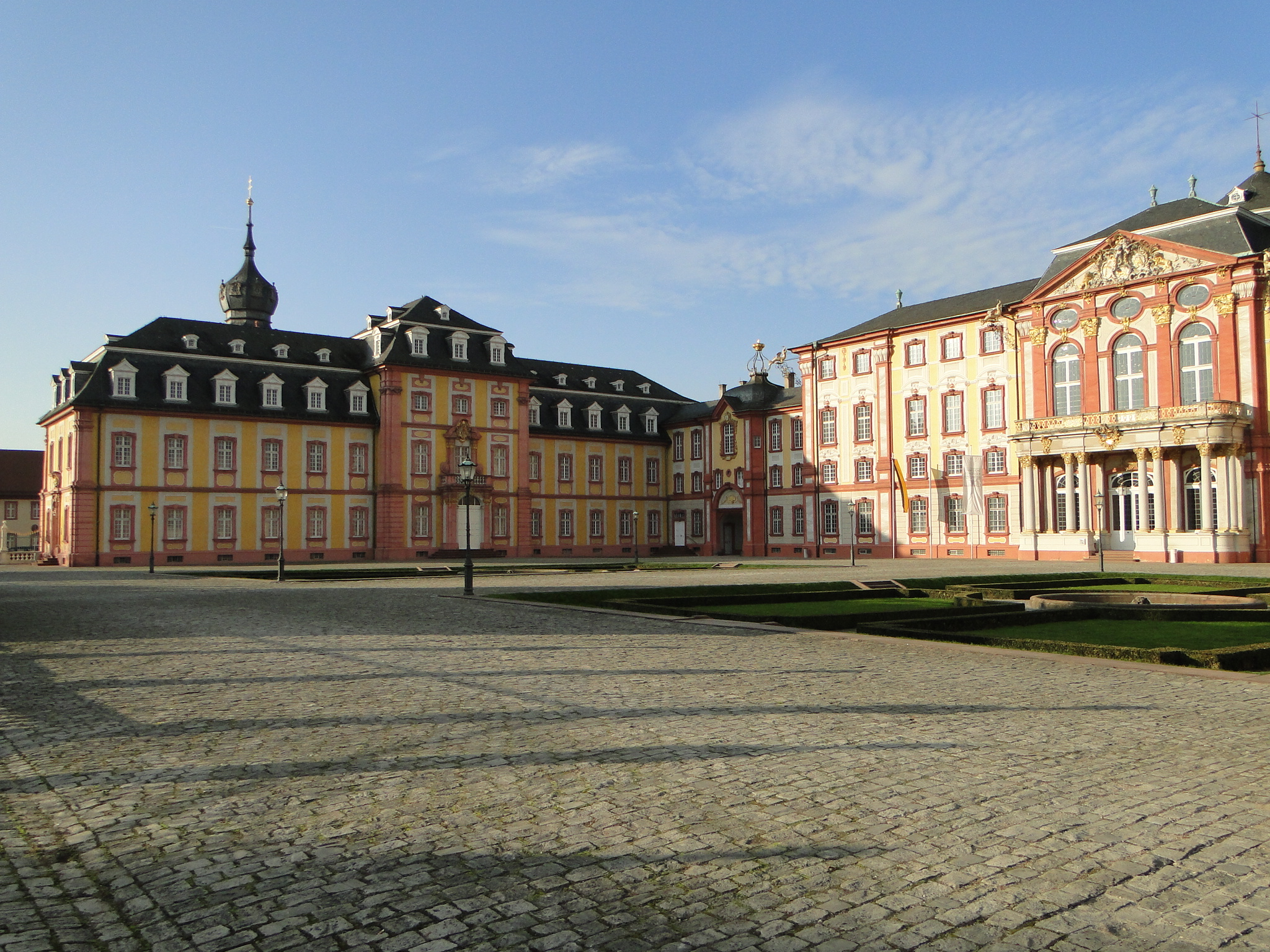 Bruchsal